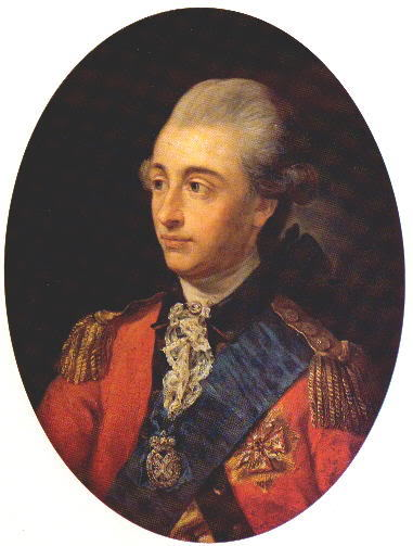 Портрет князя Станислава Понятовского (1754-1833) в мальтийском мундире со знаками орденов Белого Орла и Андрея Первозванного.